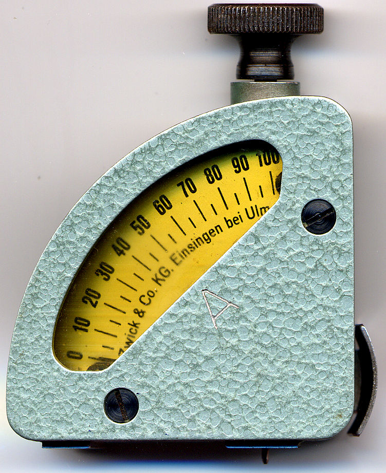 Handmessgerät zur Härtebestimmung von Elastomeren